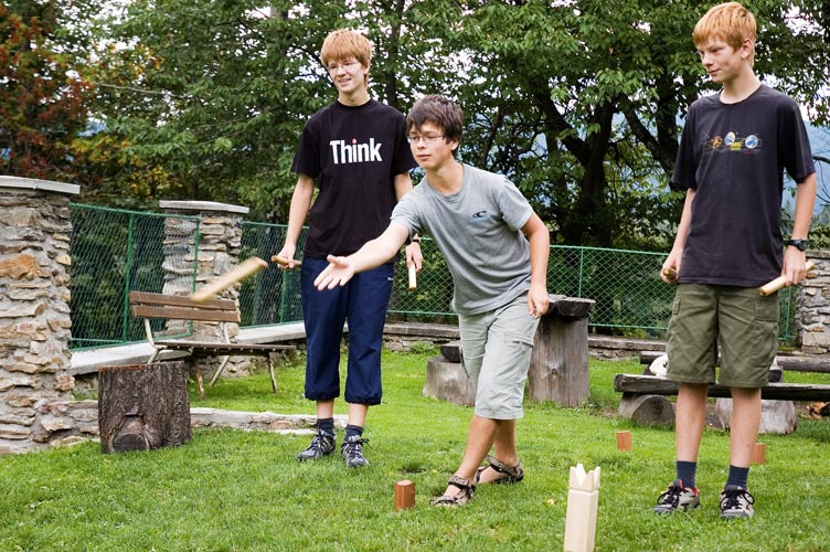 Hráči kubbu